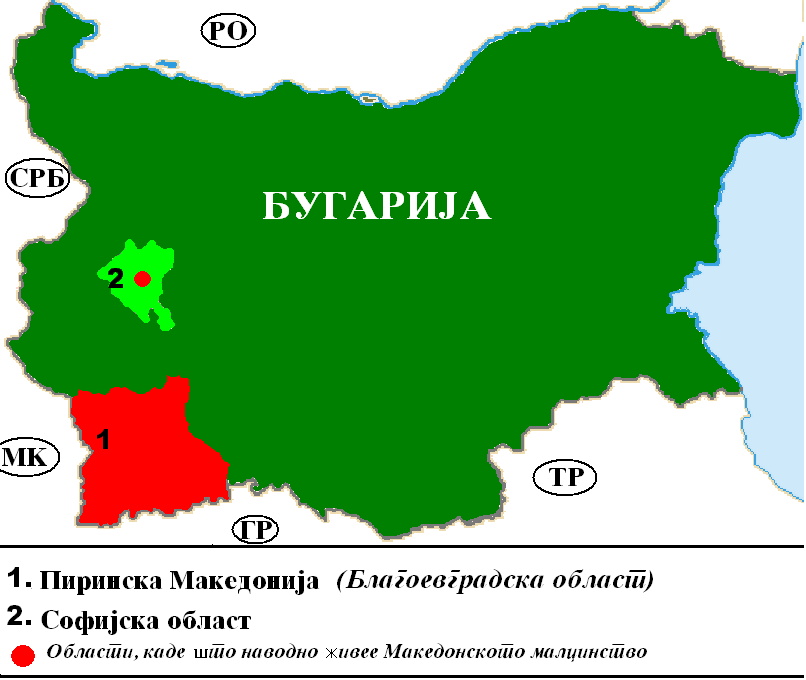 Територи каде што се смета дека живее Македонско малцинство во Бугарија